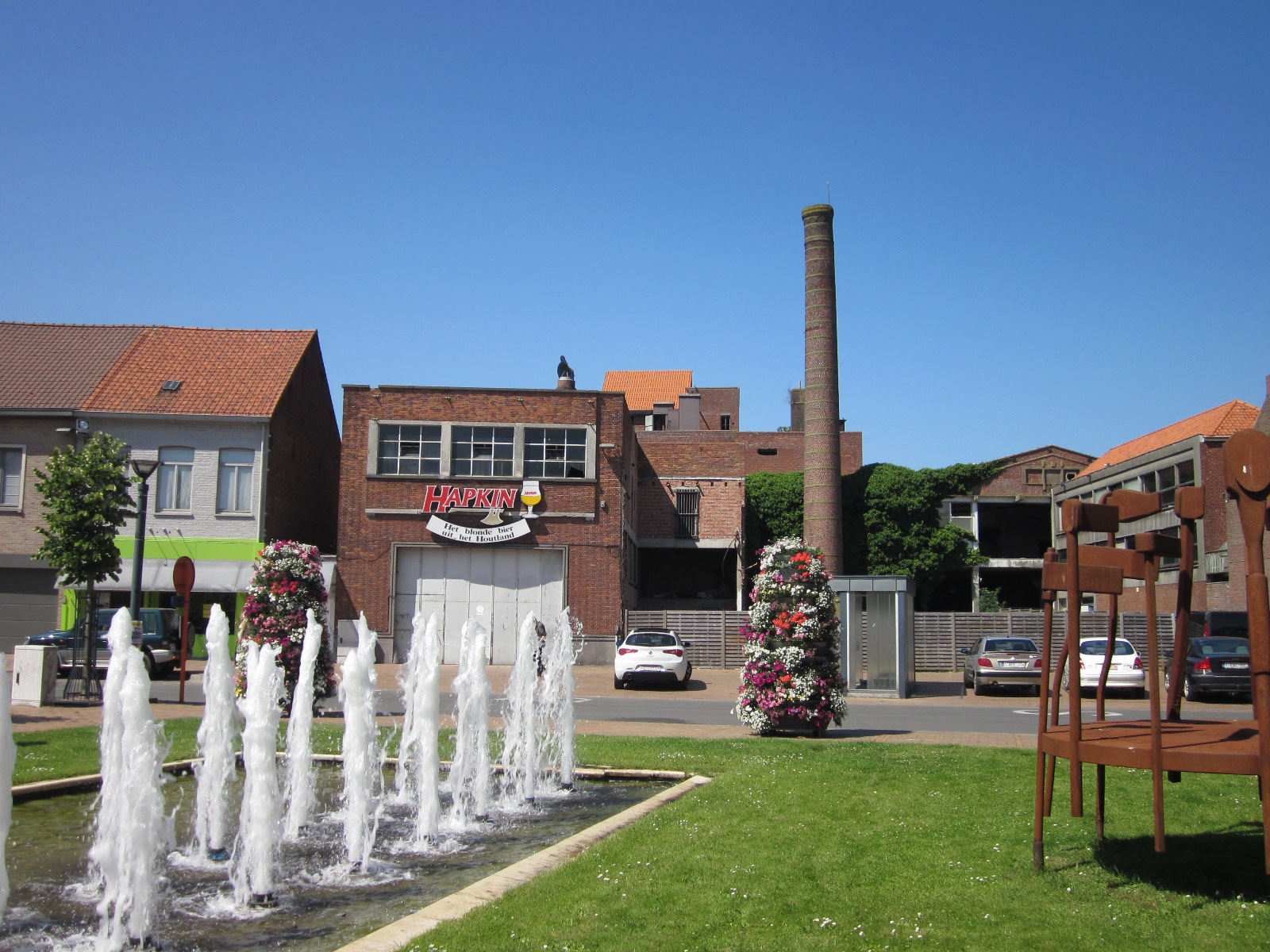 Voormalige brouwerij Louwaege, Markt 13 in Kortemark 11″ N, 3° 02′ 37.39″ E